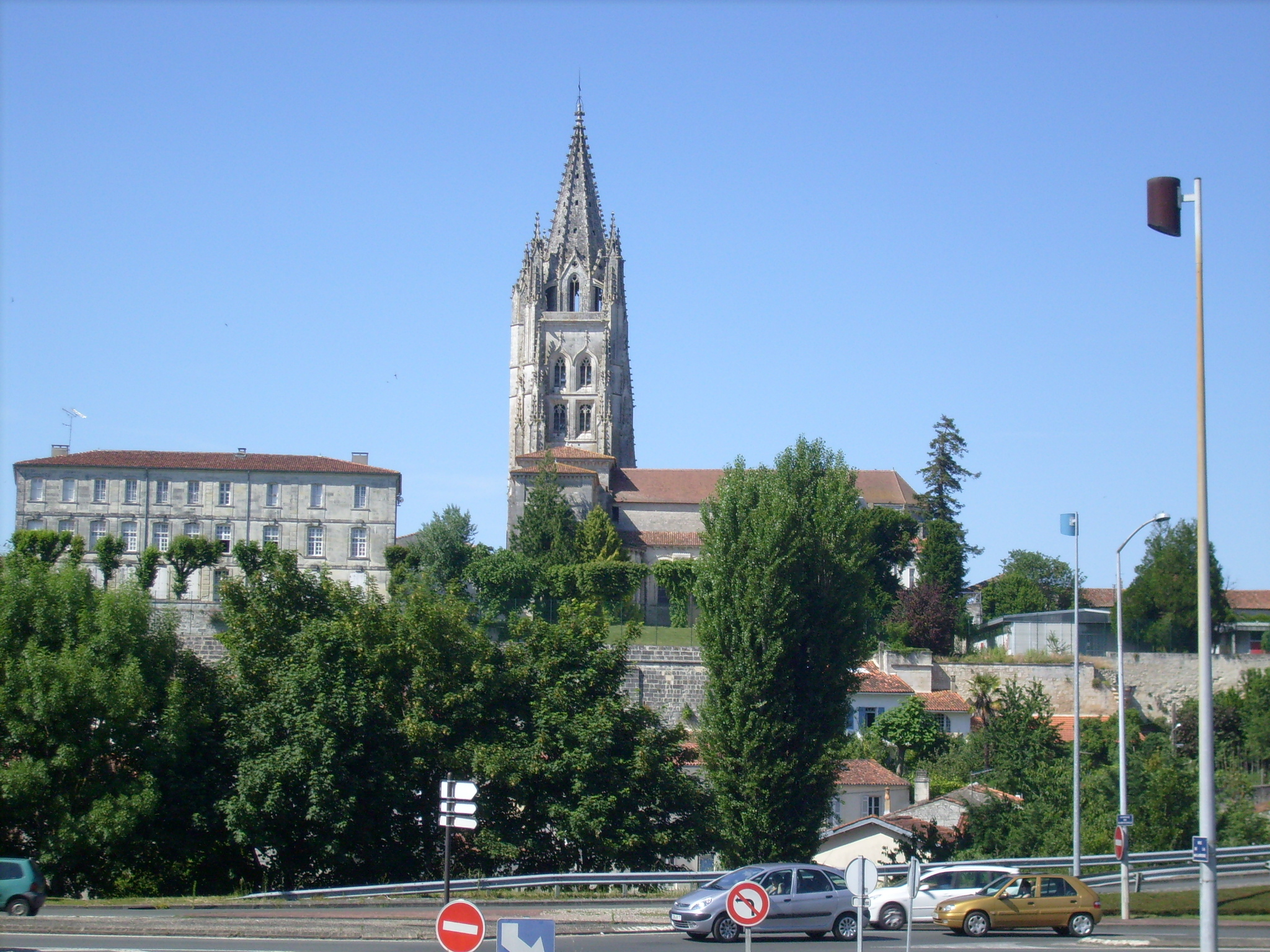 La basilique Saint-Eutrope vue depuis la rue de la Maladrerie